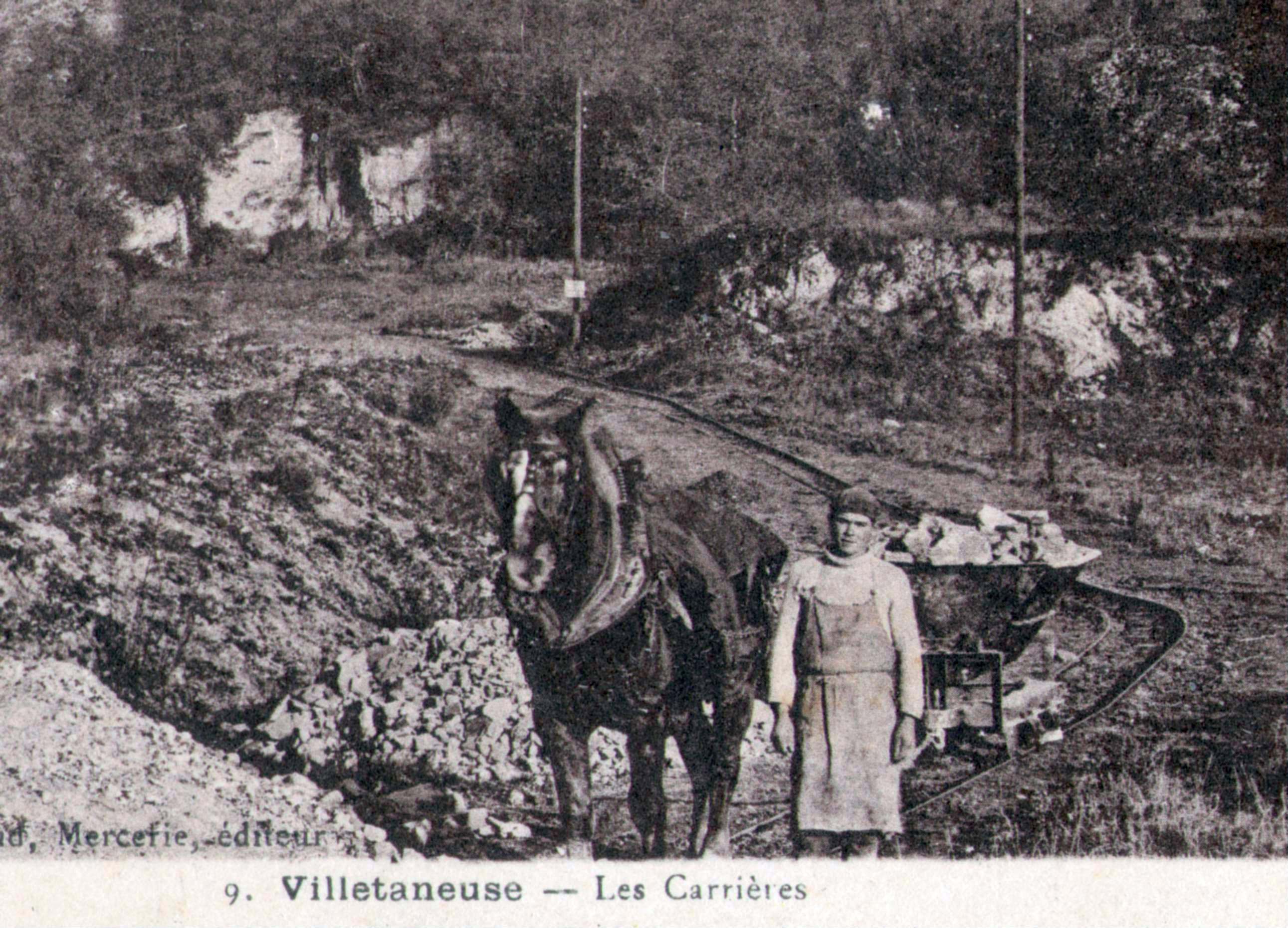 Détail d'une carte postale ancienne éditée par PACAUD :Tomberau Decauville hippomobile sur rail, à la carrière de pierre à plâtre de Villetaneuse (93)